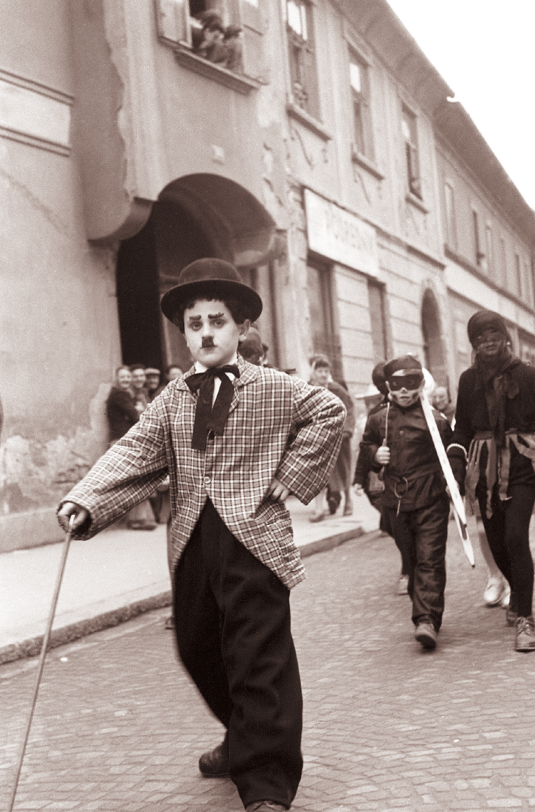 Pustni karneval v Mariboru